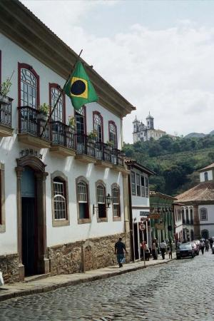 Cidade de Ouro Preto, Minas Gerais, Brasil. Em primeiro plano, à esquerda, o prédio conhecido como a 'Casa dos Contos'.